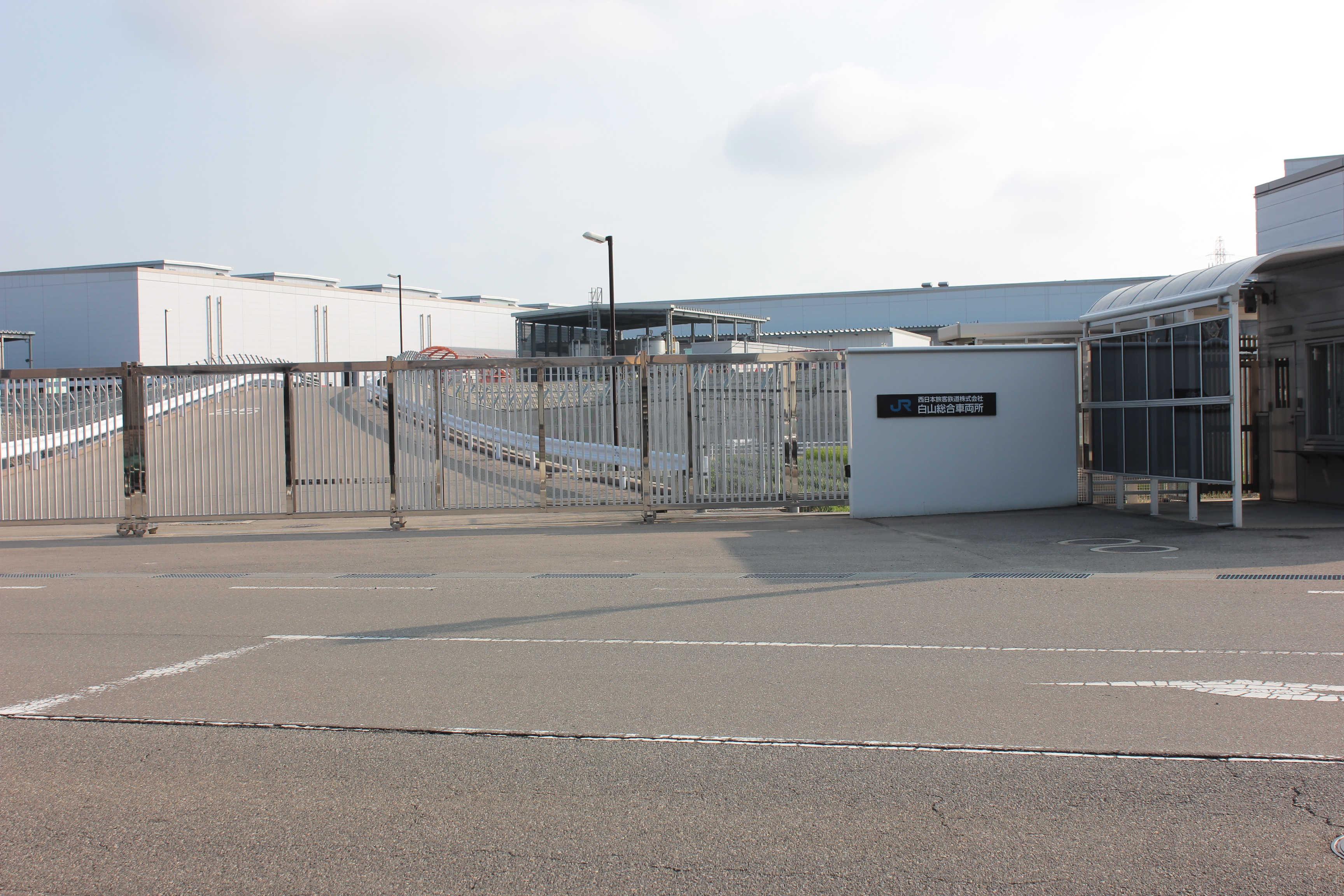 白山総合車両所正門 Canon EOS Kiss X5